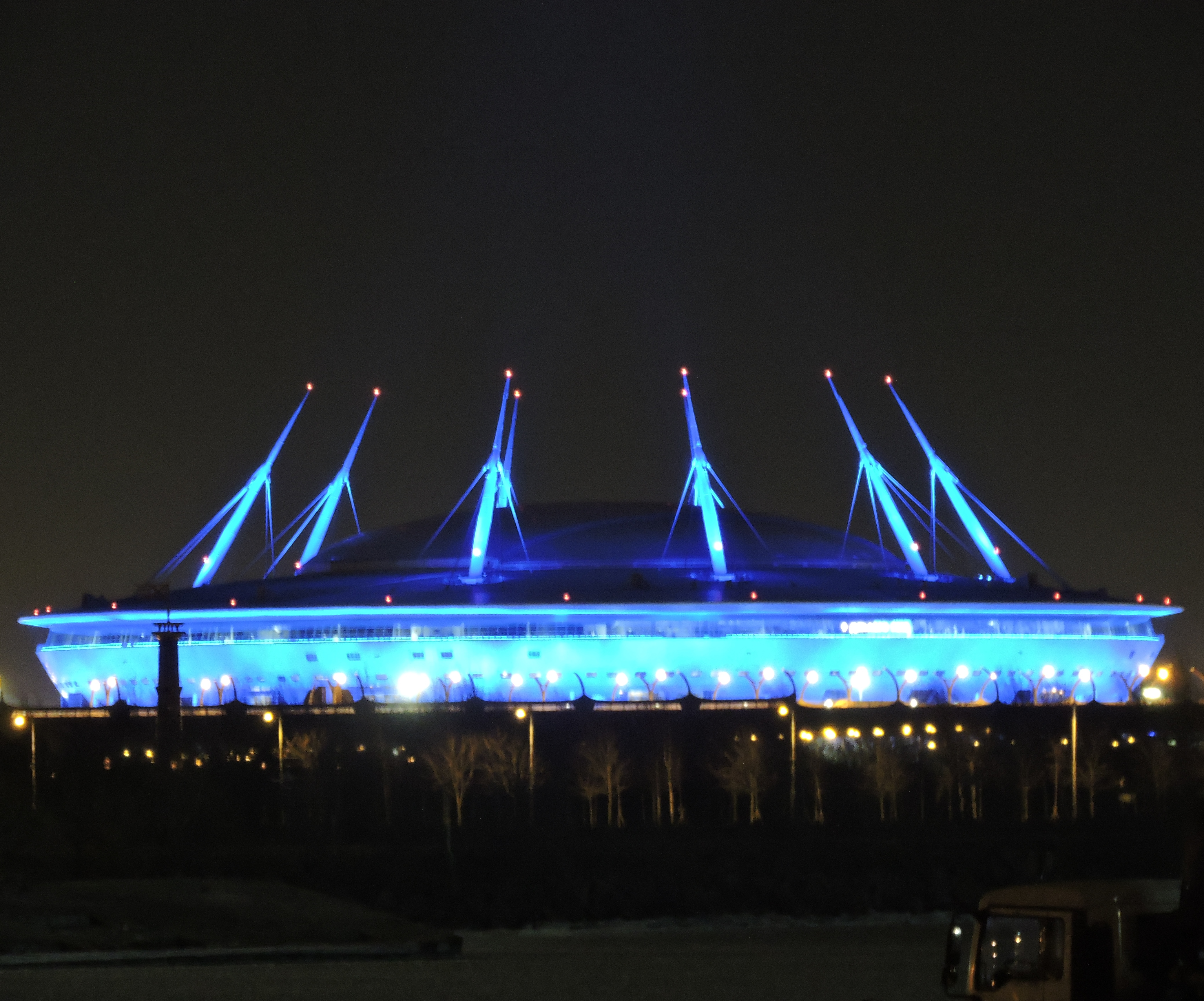 Krestovsky Stadium at night